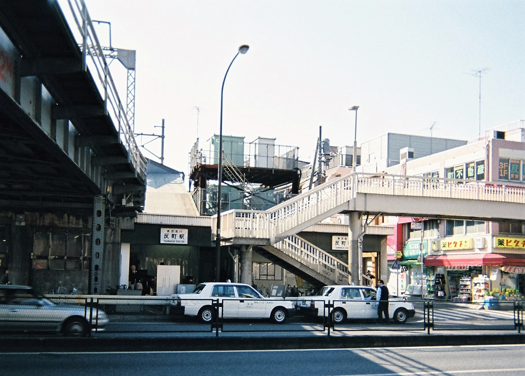 地下線切替直後の東急東横線反町駅（2004年2月22日）